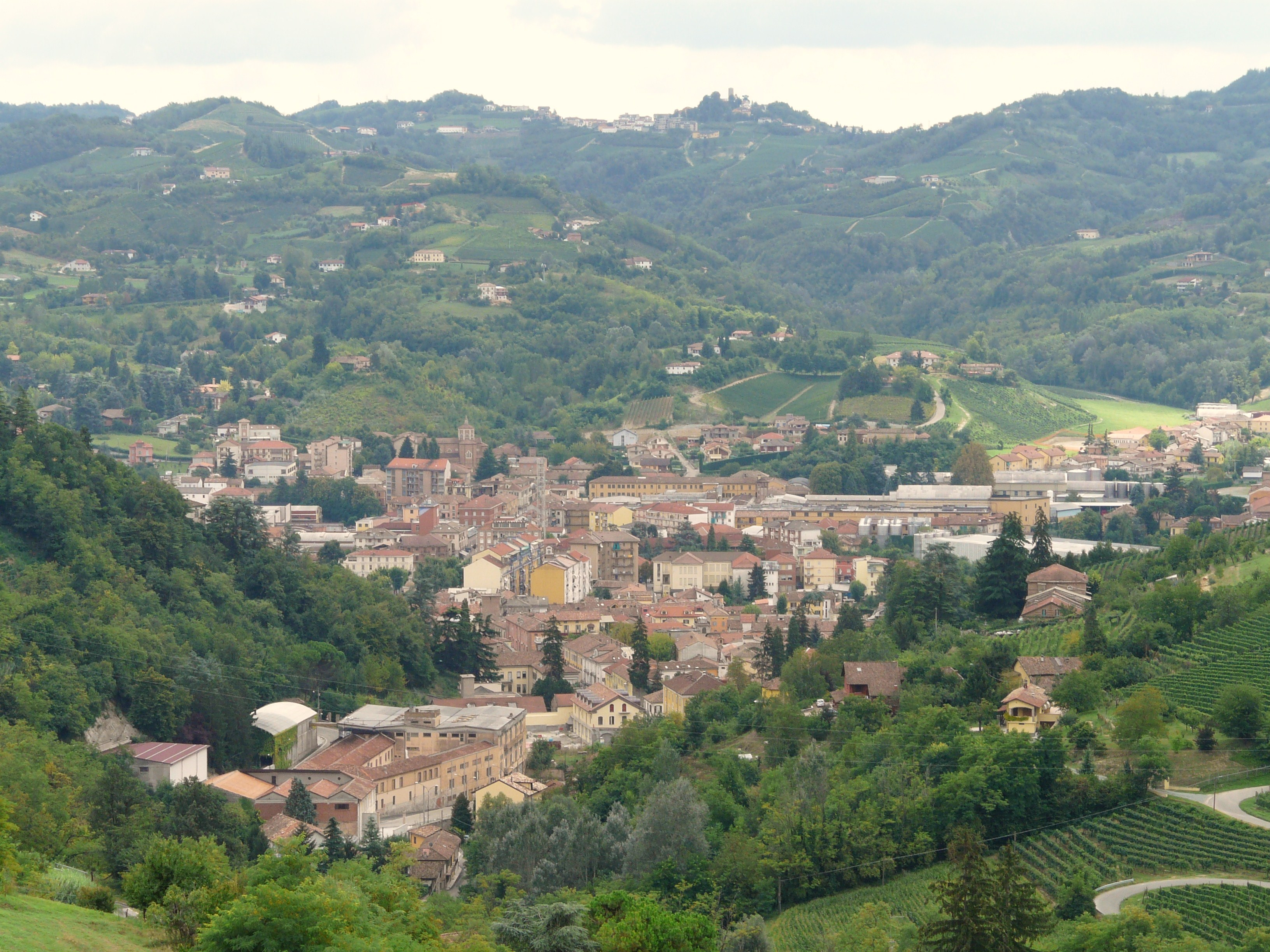 Canelli, Piemonte, Italia